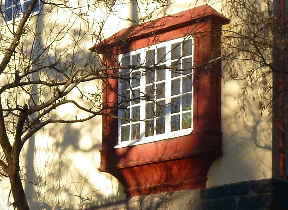 Villa Kallstenius, datalj